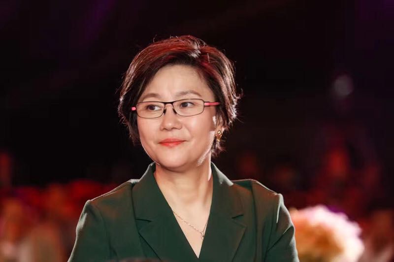 Li Shaohong dans les années 2000